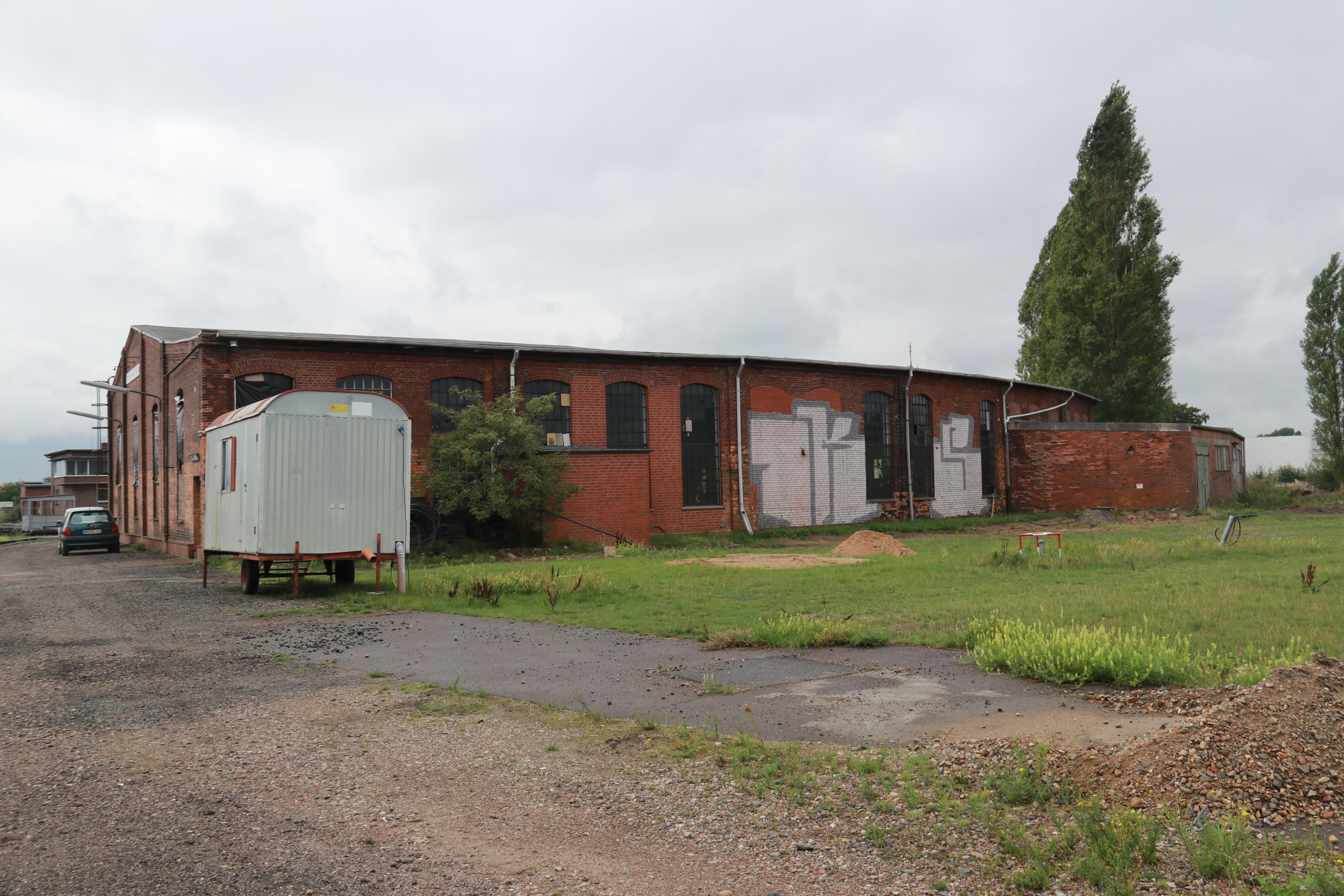 Bahnbetriebswerk Neumünster - Lokschuppen